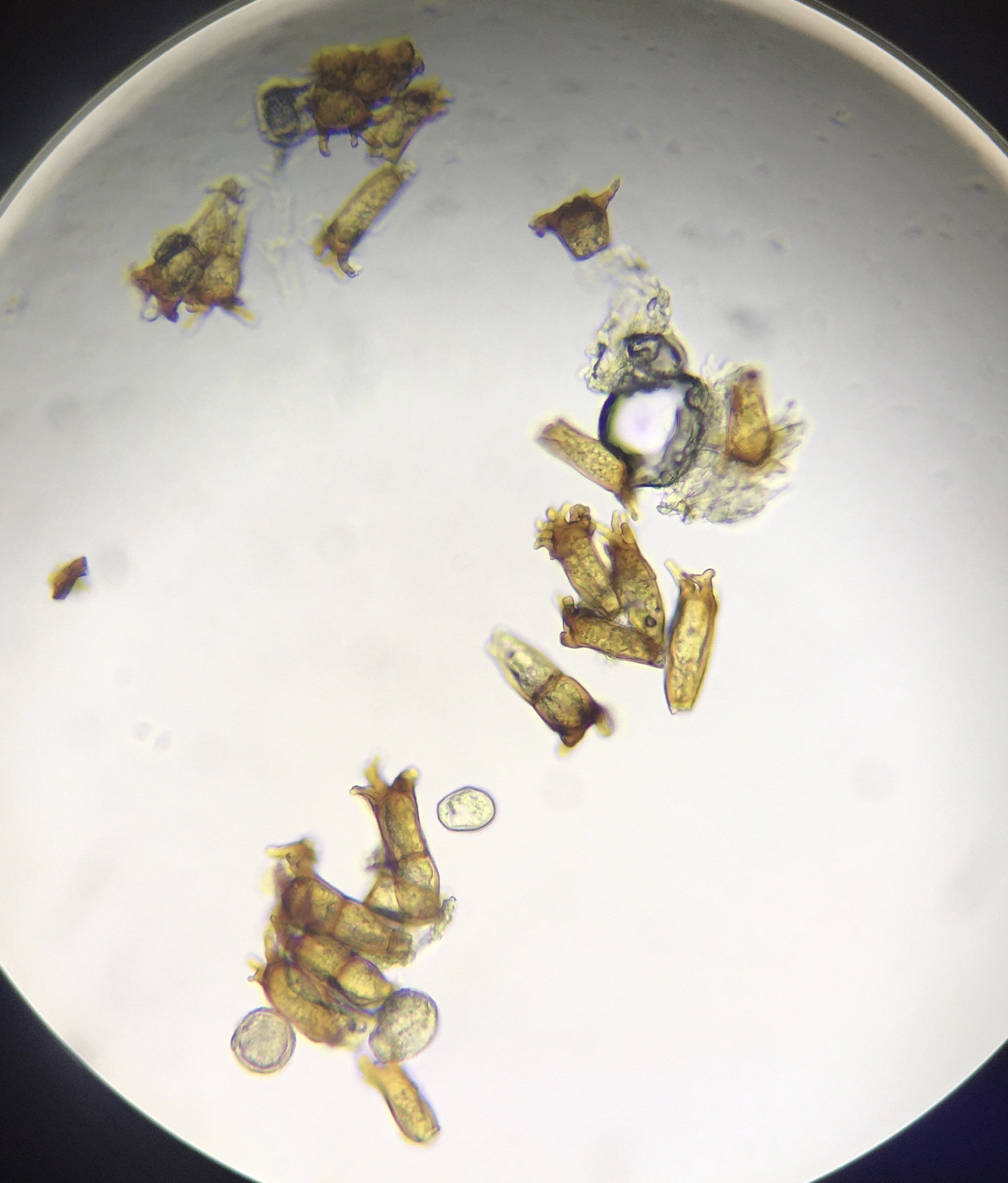 Kaera kroonrooste eosed mikroskoobi all.